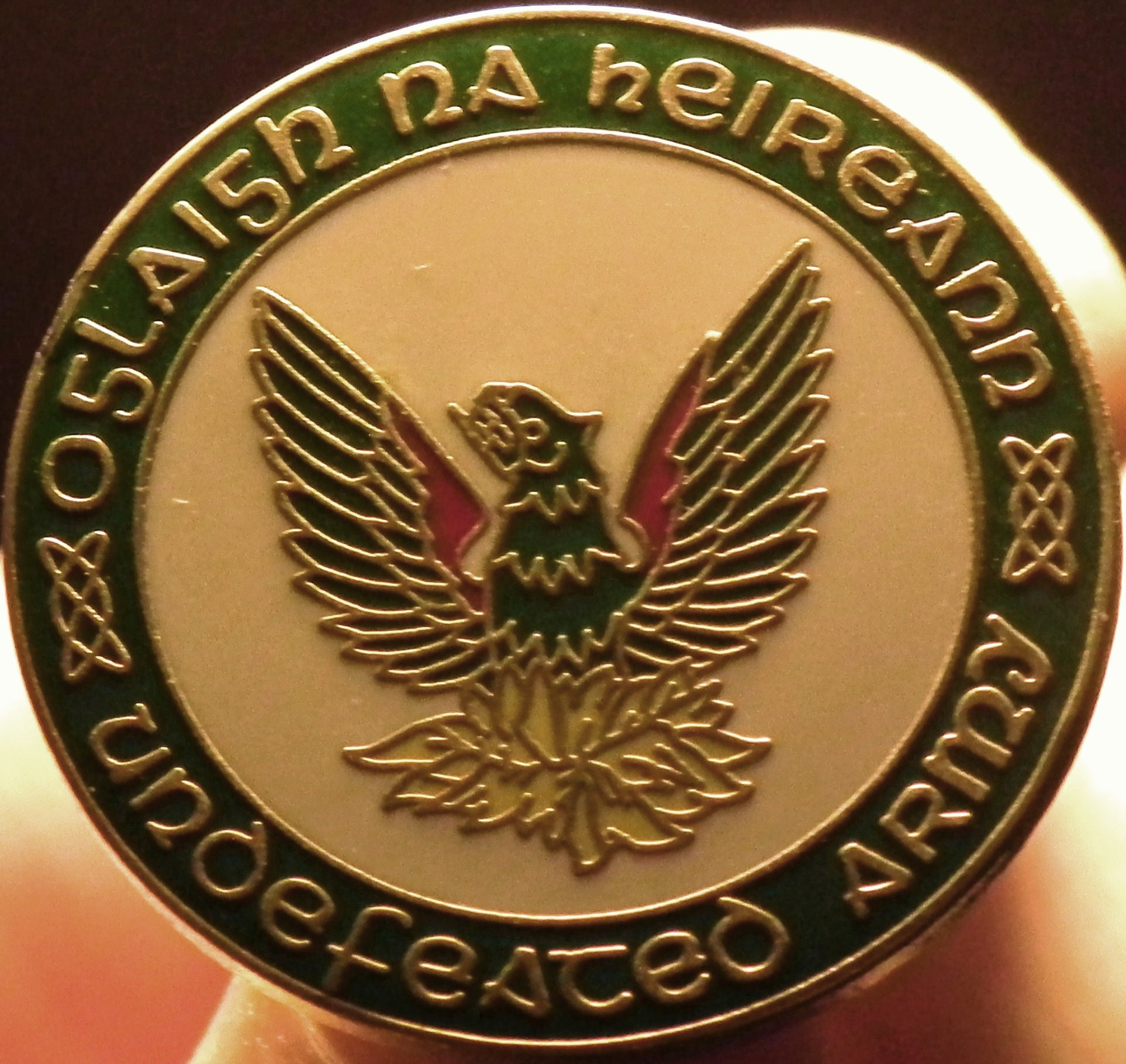 Provisional IRA badge